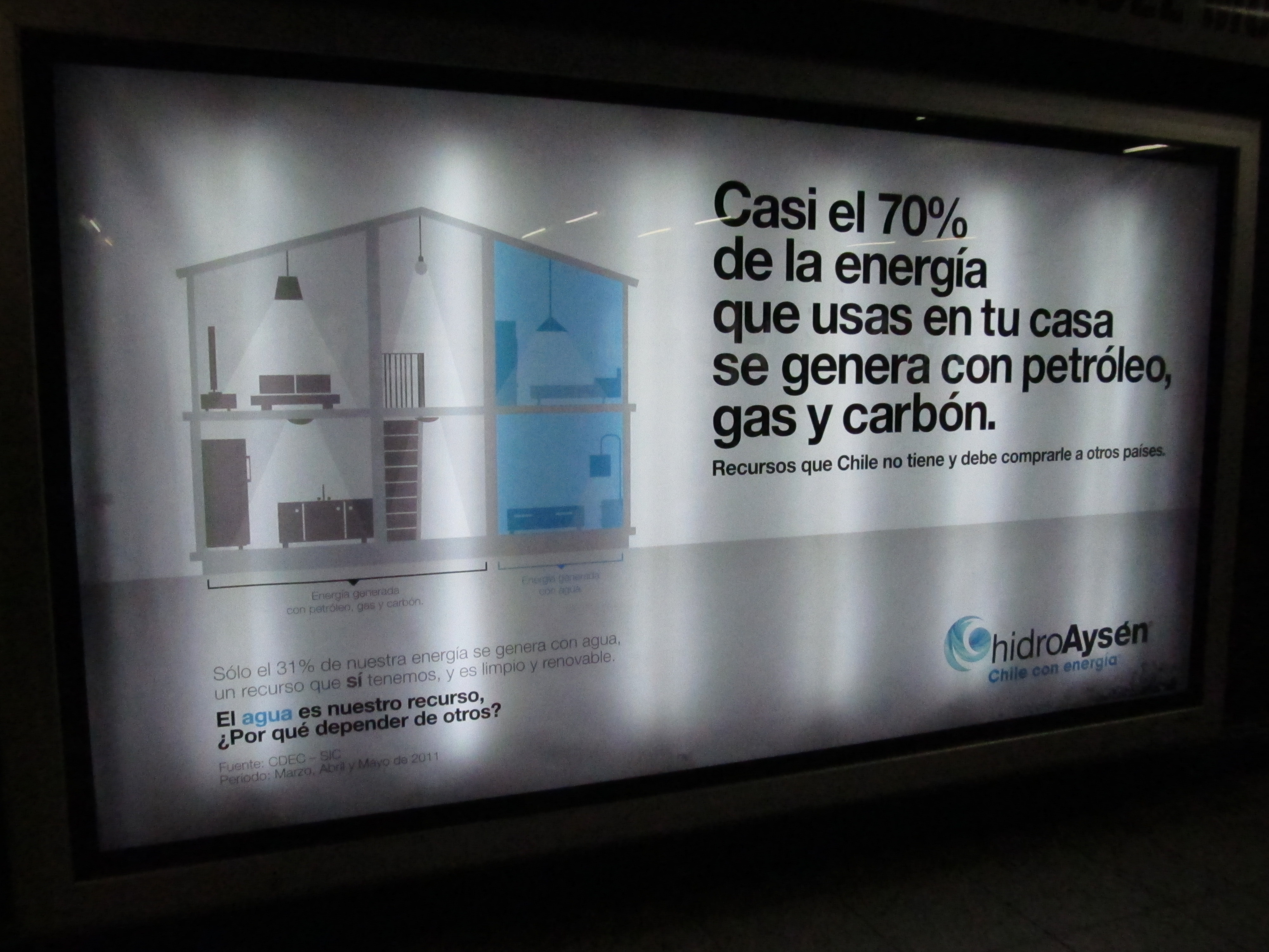 Publicidad de Hidroaysén en el Metro de Santiago de Chile.